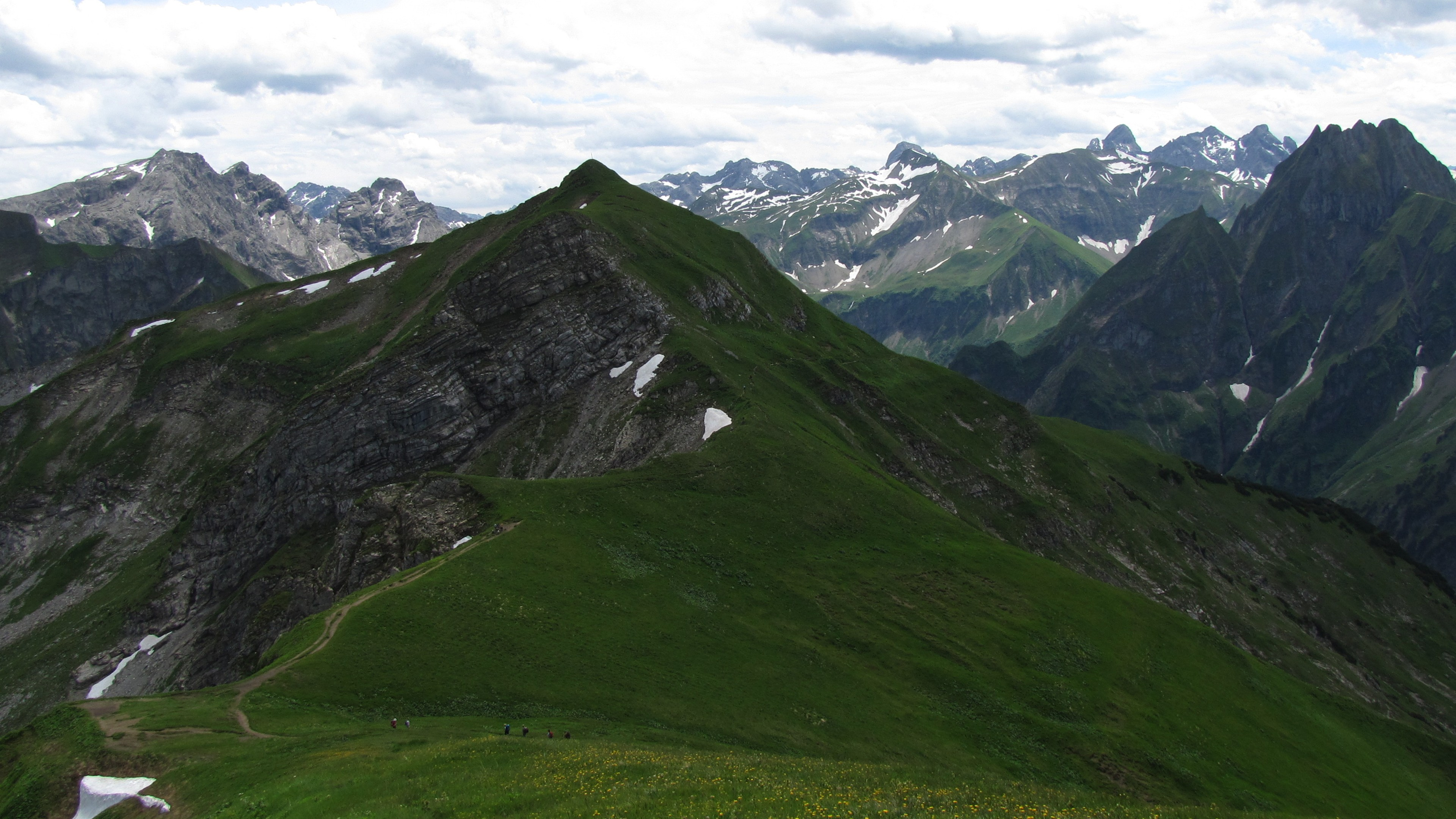 Blick vom Kleinen Seekopf nach Süden zum Schochen (2100 m), dahinter die Wildengruppen und die Höfats (2259 m), sowie Raucheck (2384 m) und Kreuzeck (2376 m).